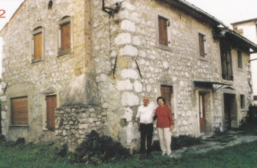 Foto da casa construída toda em pedra, no século 19, por meu bisavô João Batista Uliano, em Vêneto, Itália, onde morou com sua família até 1875, quando veio morar no Brasil.